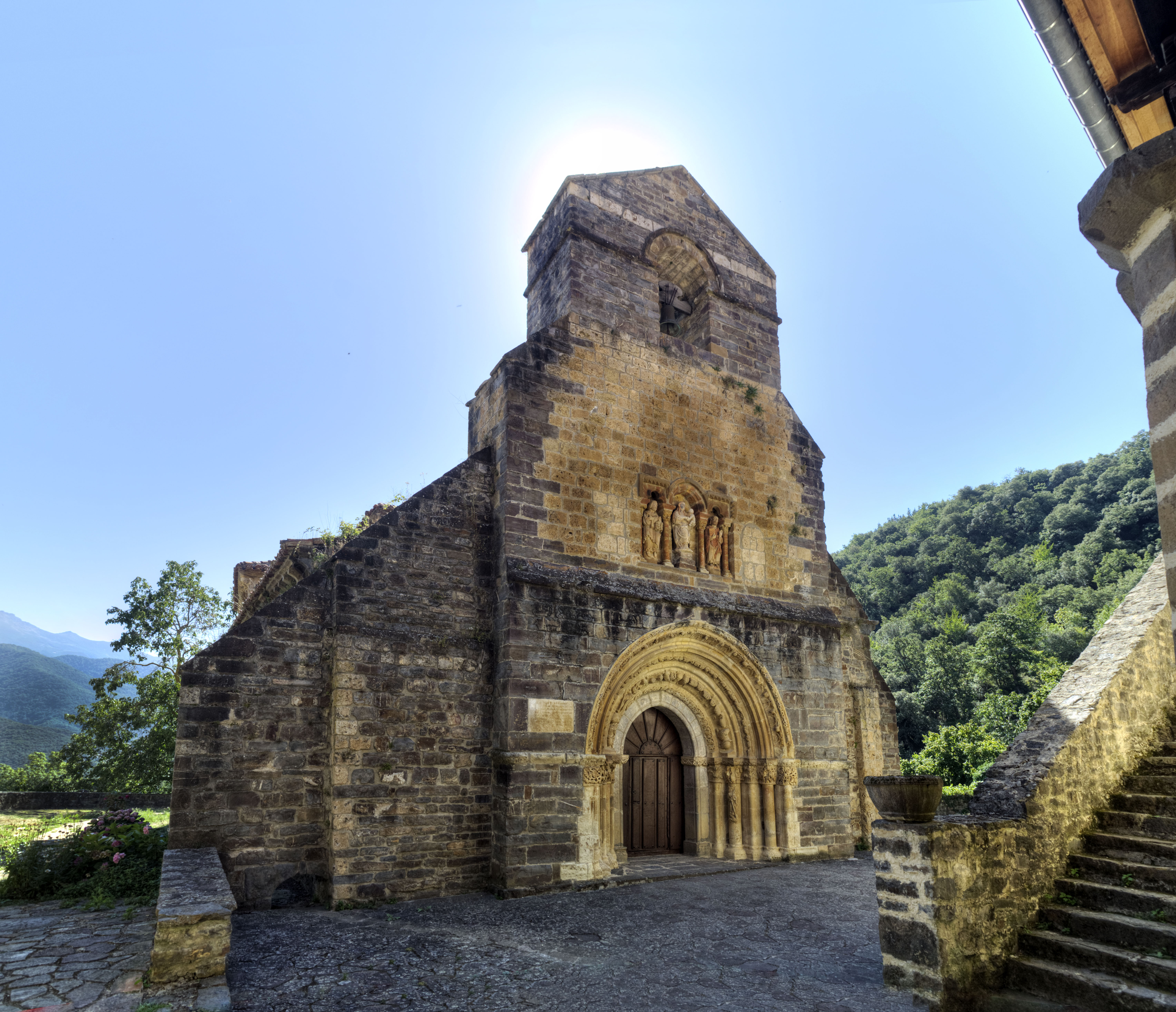 En Piasca, Cantabria, hay documentada una iglesia-monasterio que ya existía en el año 930. La actual se construyó en el año 1172 tal como dice en la piedra más clara que se ve al lado de la portada. Según la epigrafía que se conserva, las portadas son del maestro Covaterio.